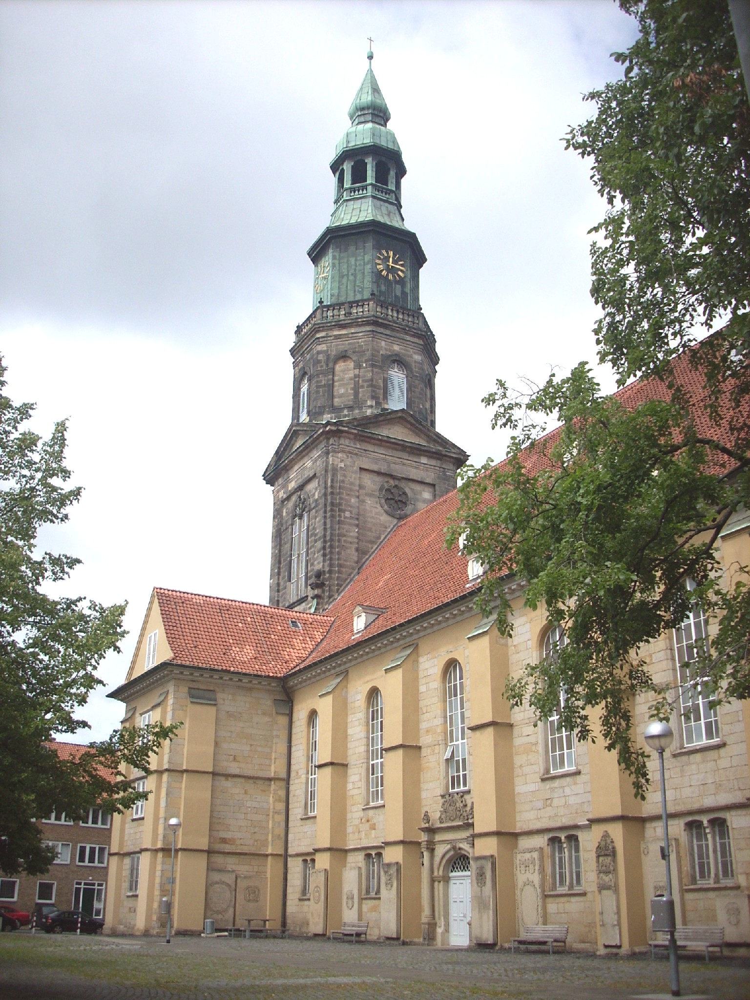 Hannover, Neustädter Kirche